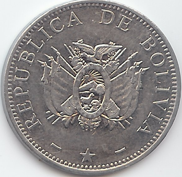 Pièce de monnaie de Bolivie